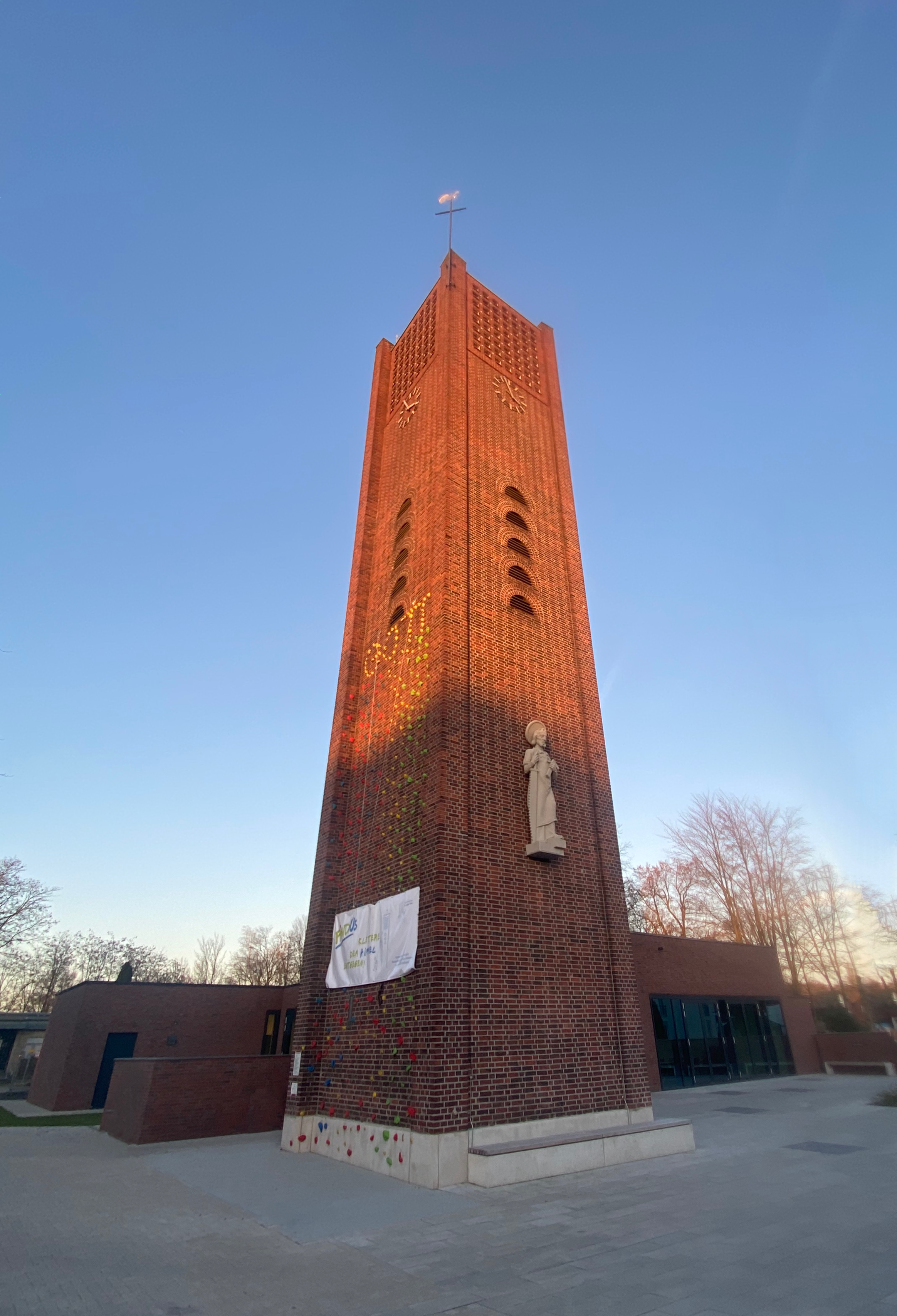 Selm, St. Josef nach dem Rückbau, Kirchturm mit Nebengebäuden Overbergweg 20